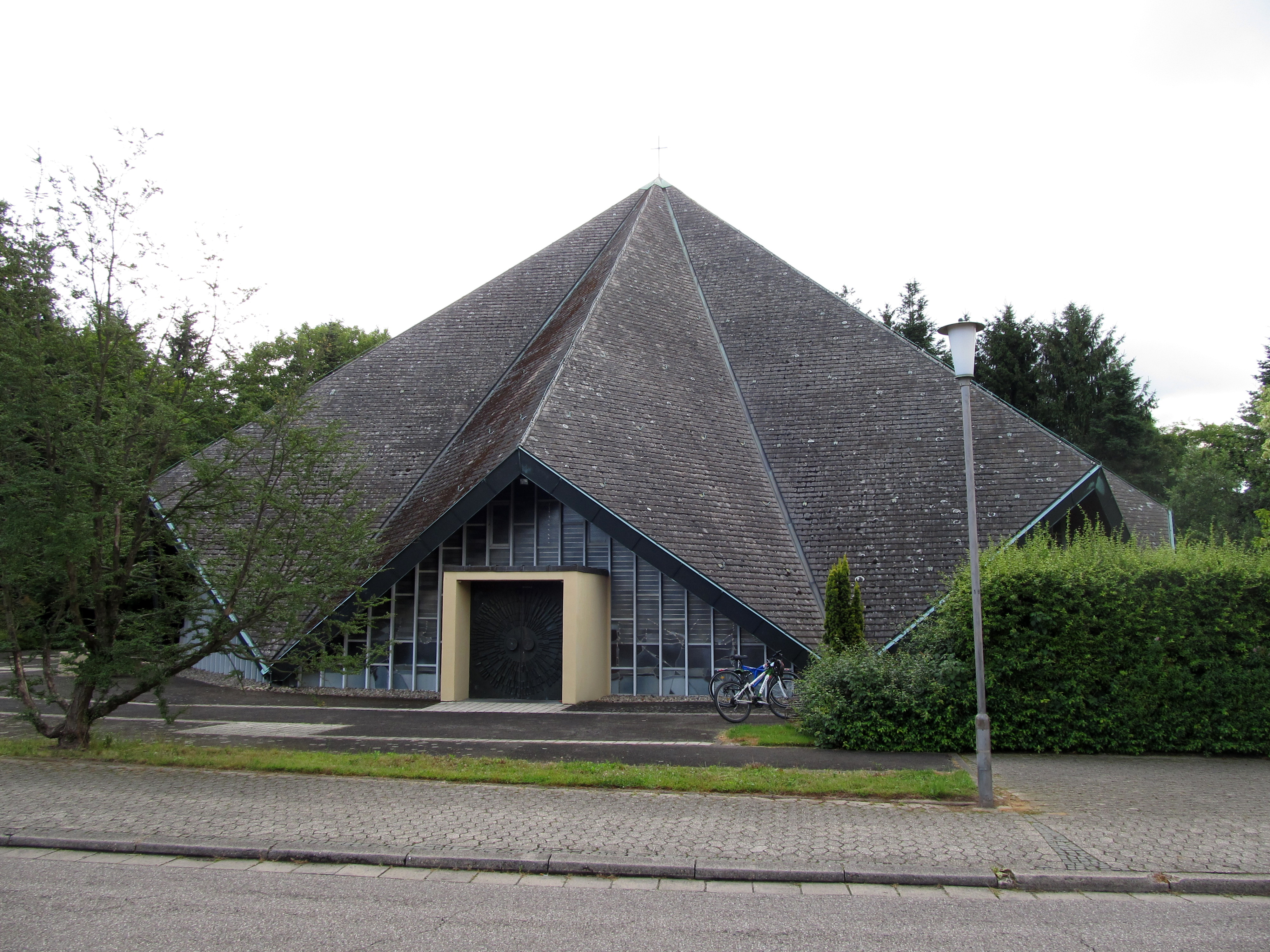 Die katholische Pfarrkirche St. Michael in St. Ingbert, Saarland